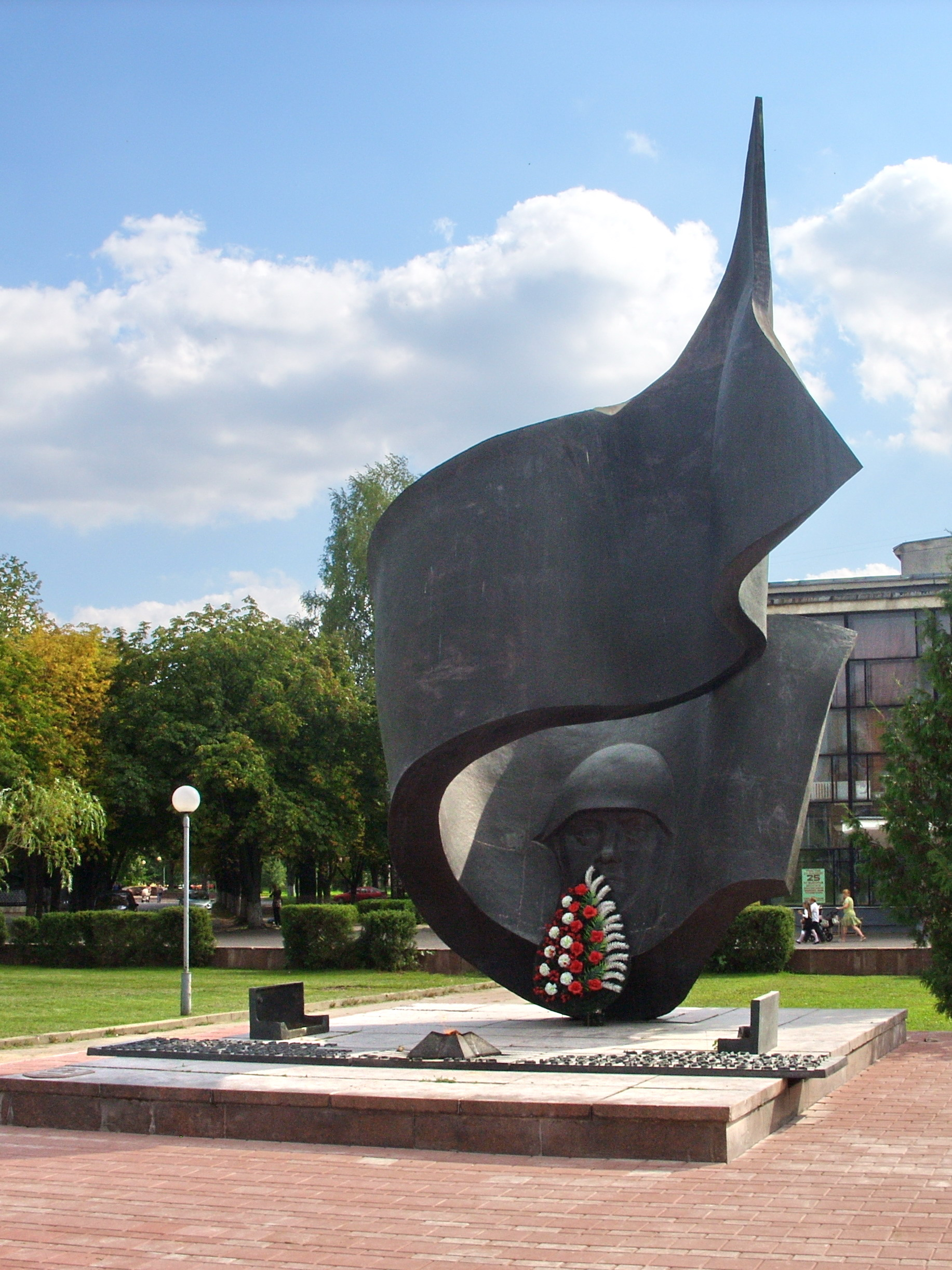 Беларуская (тарашкевіца): Помнік жаўнерам і партызанам, якія вызвалялі г. Баранавічы ад нямецка-фашысцкіх захопнікаў 8 ліпеня 1944 г.. г. Баранавічы This is a photo of Belarusian heritage monument. Reference number: 113Д000024 ( WLM)